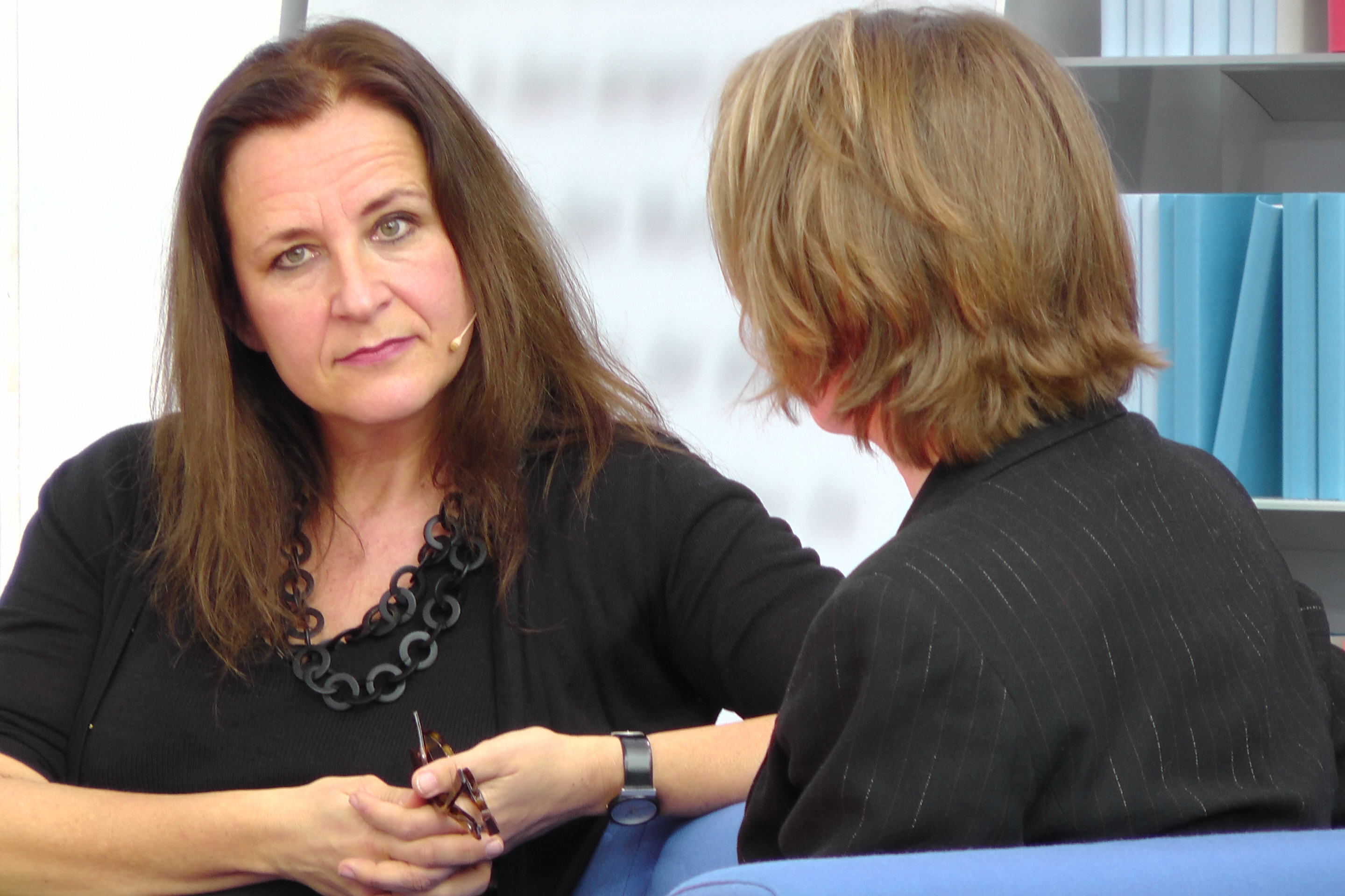 Schriftstellerin Gabriele Riedle im Gespräch auf dem Blauen Sofa während der Leipziger Buchmesse 2012.